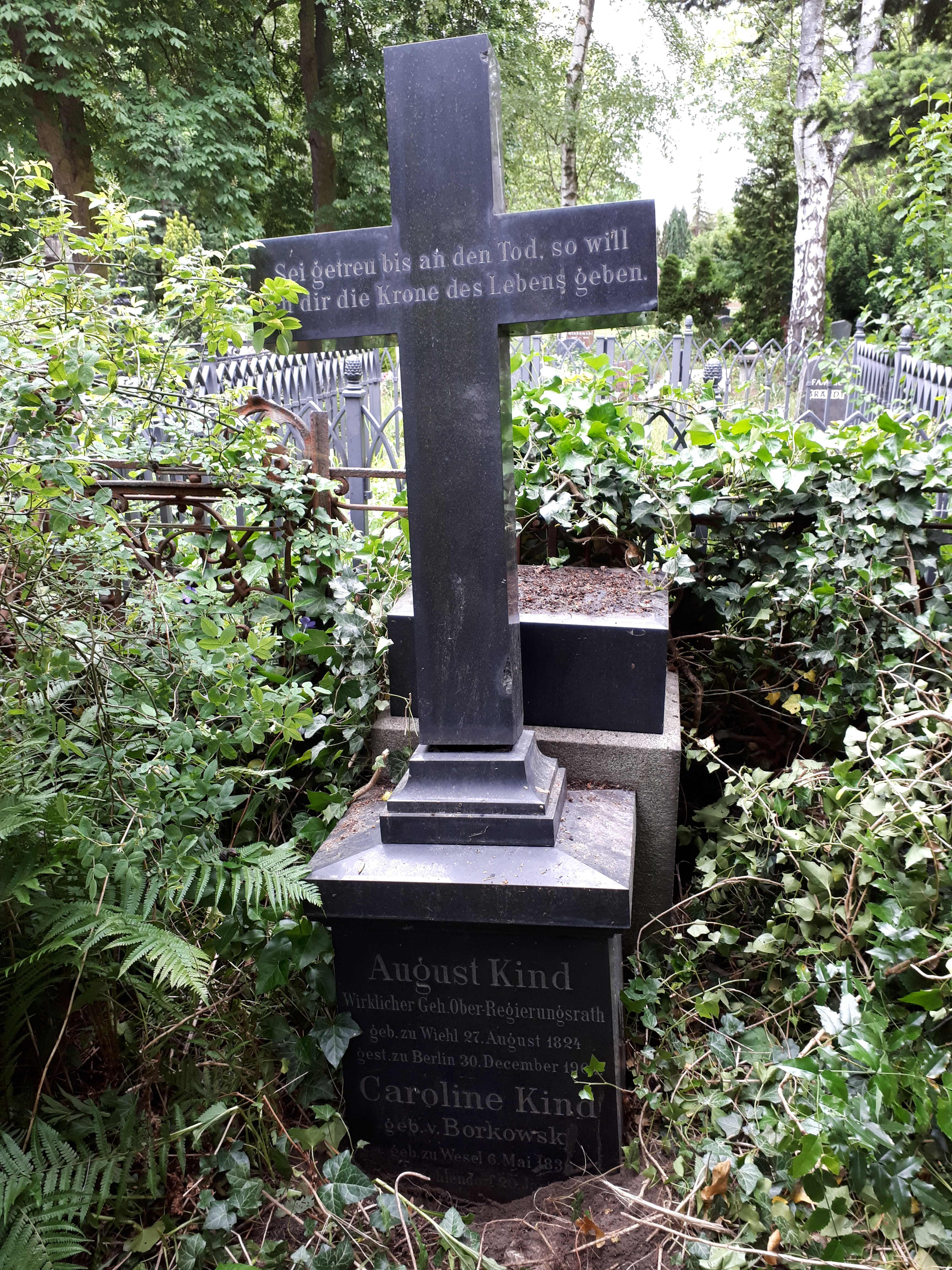 Familiengrabstelle Kind 1904 und 1915